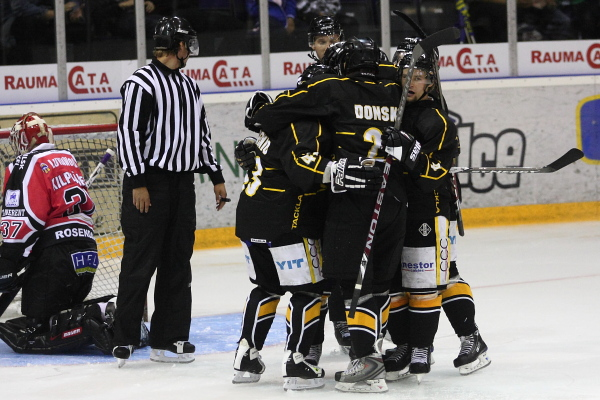 Kärpät